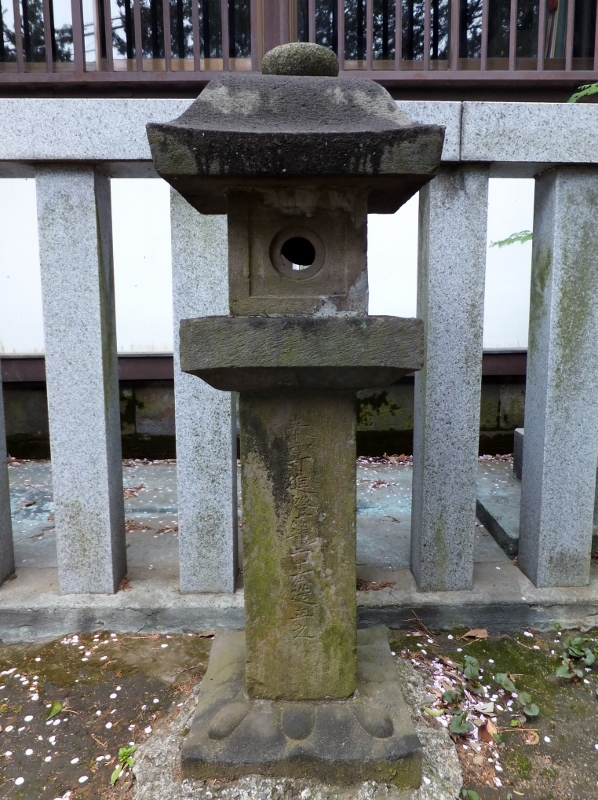 尉殿神社石燈籠（右） 2016年4月10日撮影